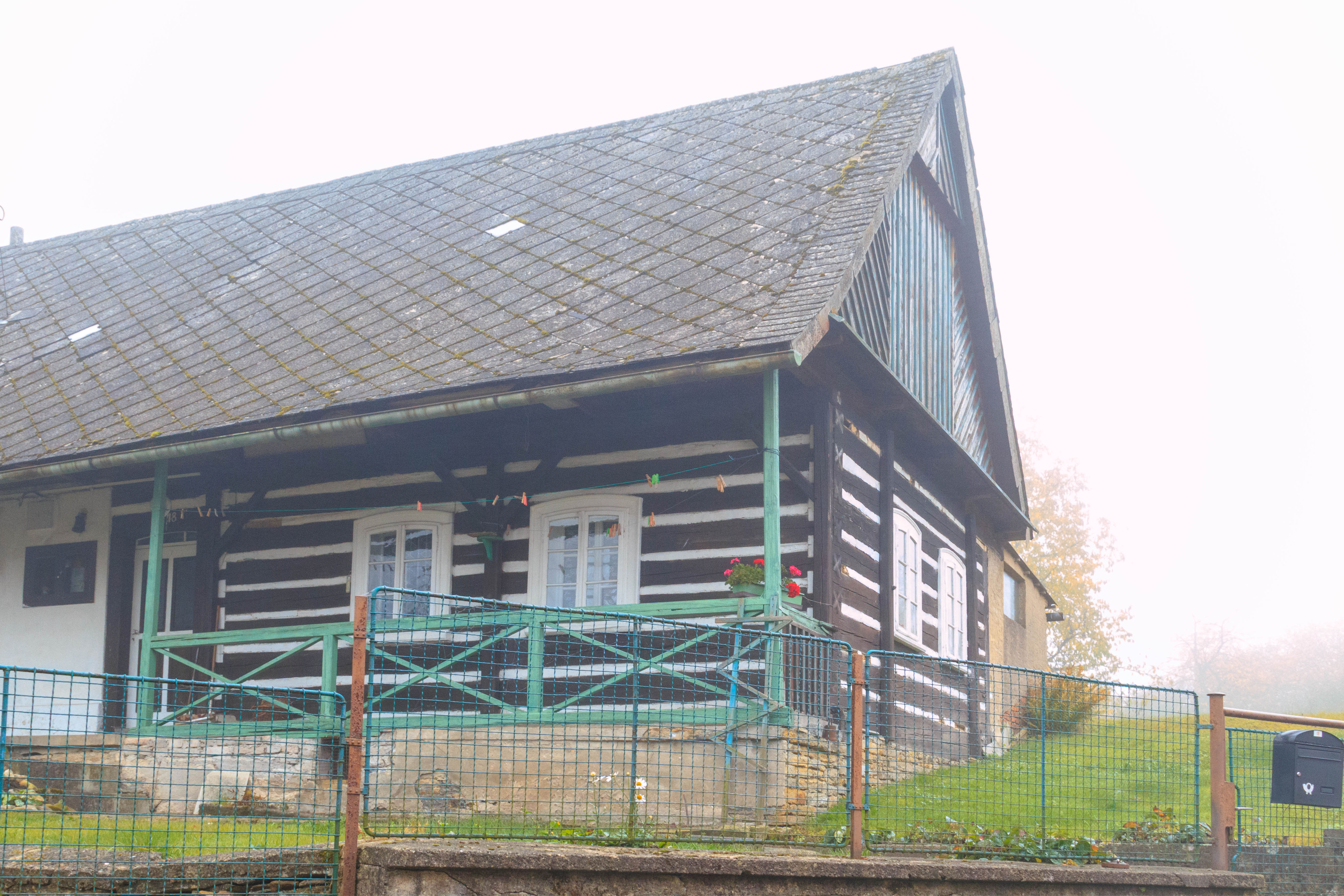 Uhřínovice u Voděrad - čp. 18